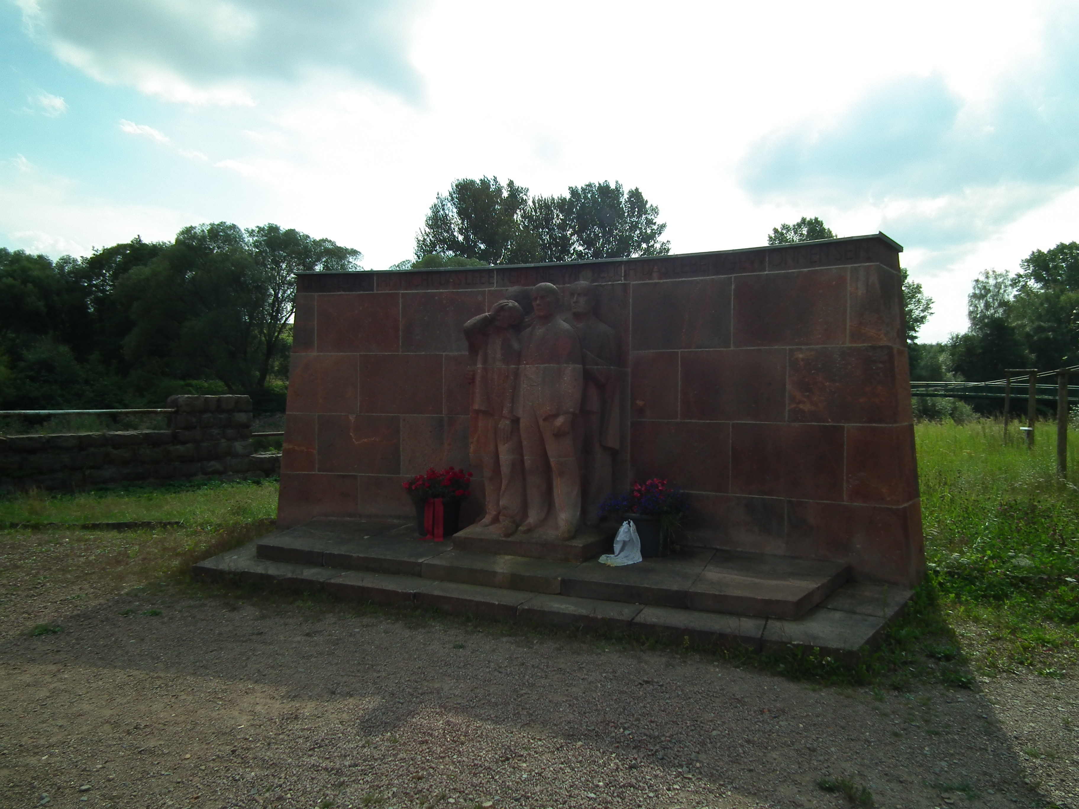 Sachsenburg